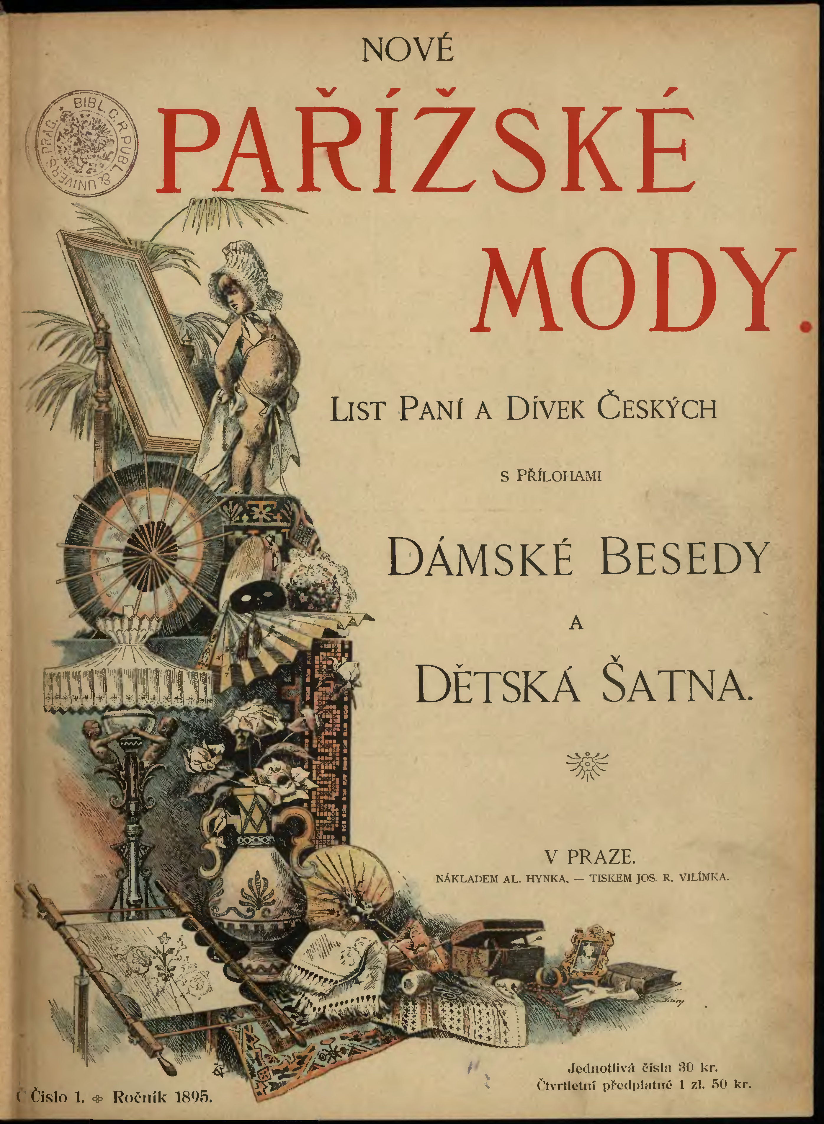 Úvodní list časopisu „Nové pařížské mody“ z 1.1.1895.